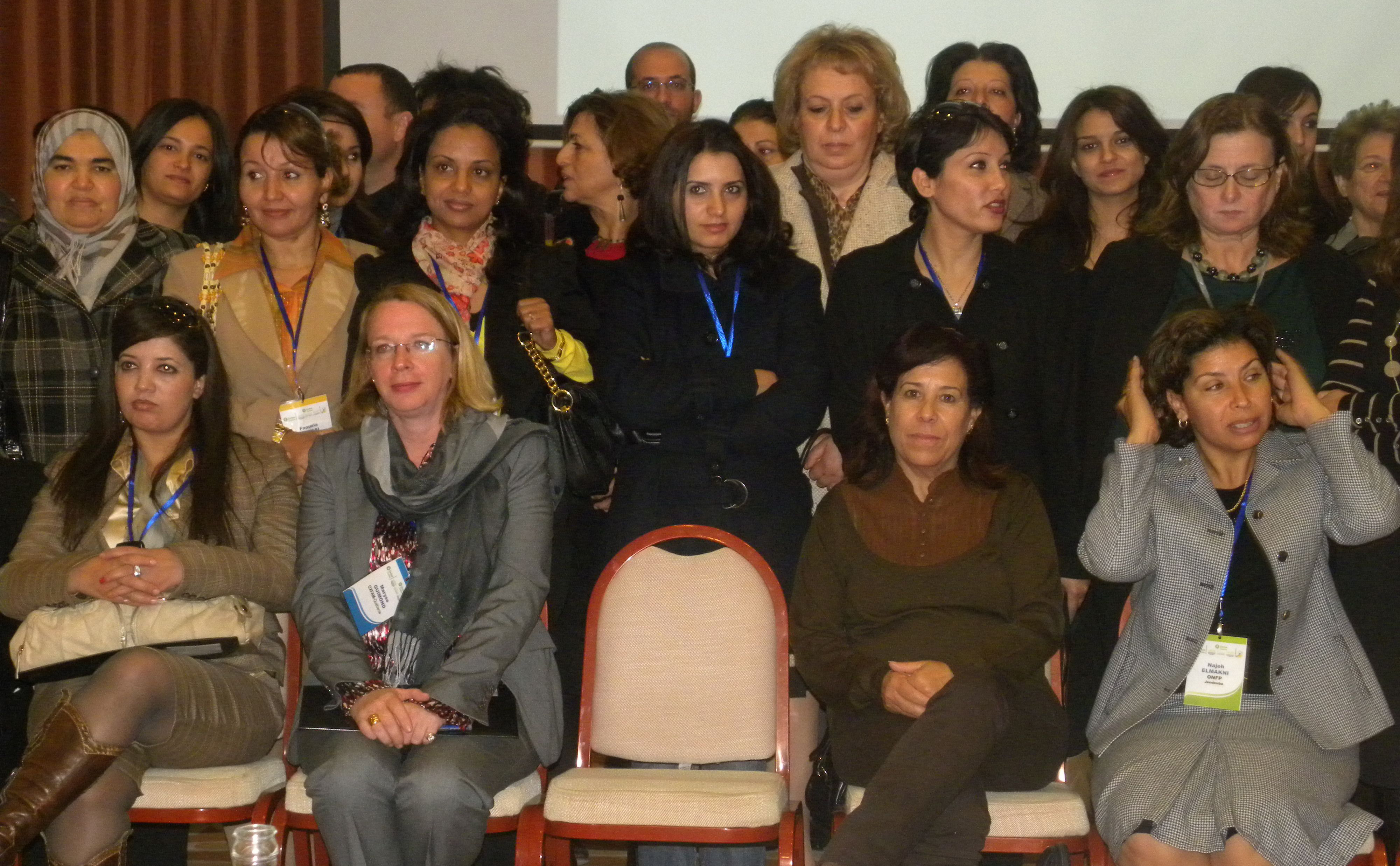 [Magharebia/Jamel Arfaoui] Centre for Arab Women Training and Research (CAWTAR) hosted a forum designed to strengthen female involvement in rural development. استضاف مركز كوثر منتدى يهدف إلى تعزيز انخراط المرأة في التنمية القروية Le CAWTAR a organisé un forum destiné à renforcer l'implication des femmes dans le développement rural. Full story